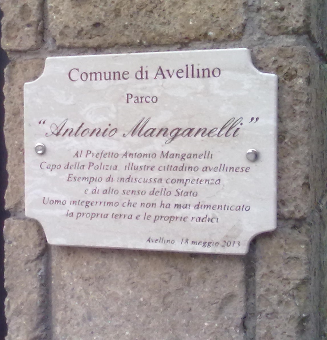 Intitolazione Parco "Santo Spirito" ad Antonio Manganelli